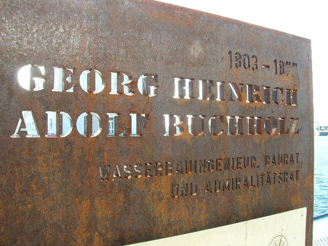 Stele aus COR-TEN-Stahl für den Wasserbauingenieur Adolf Buchholz am Geestemünder Hauptkanal.